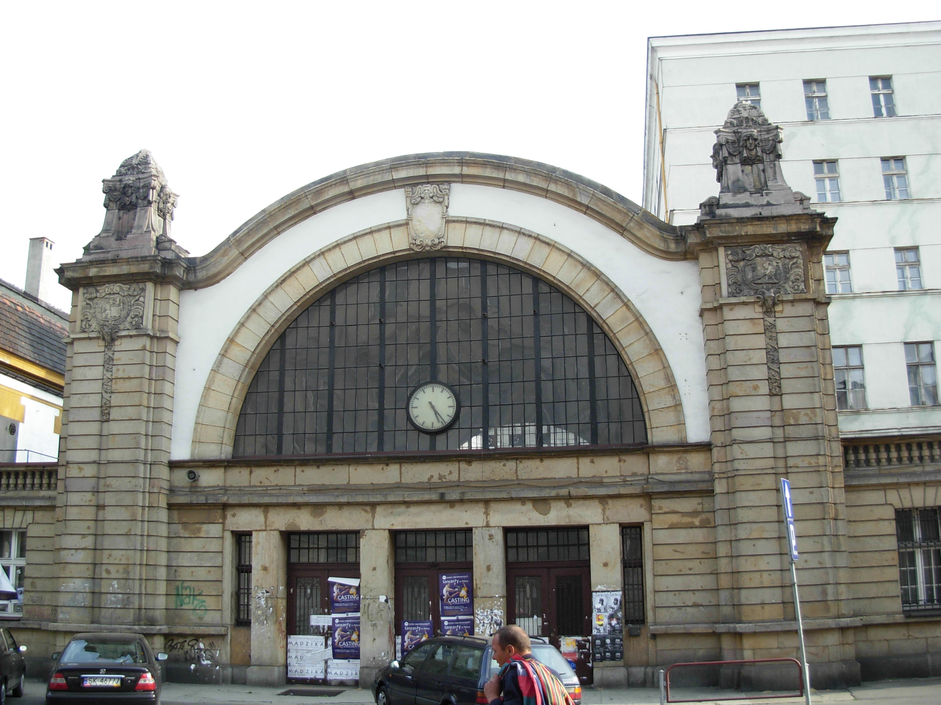 Katowice